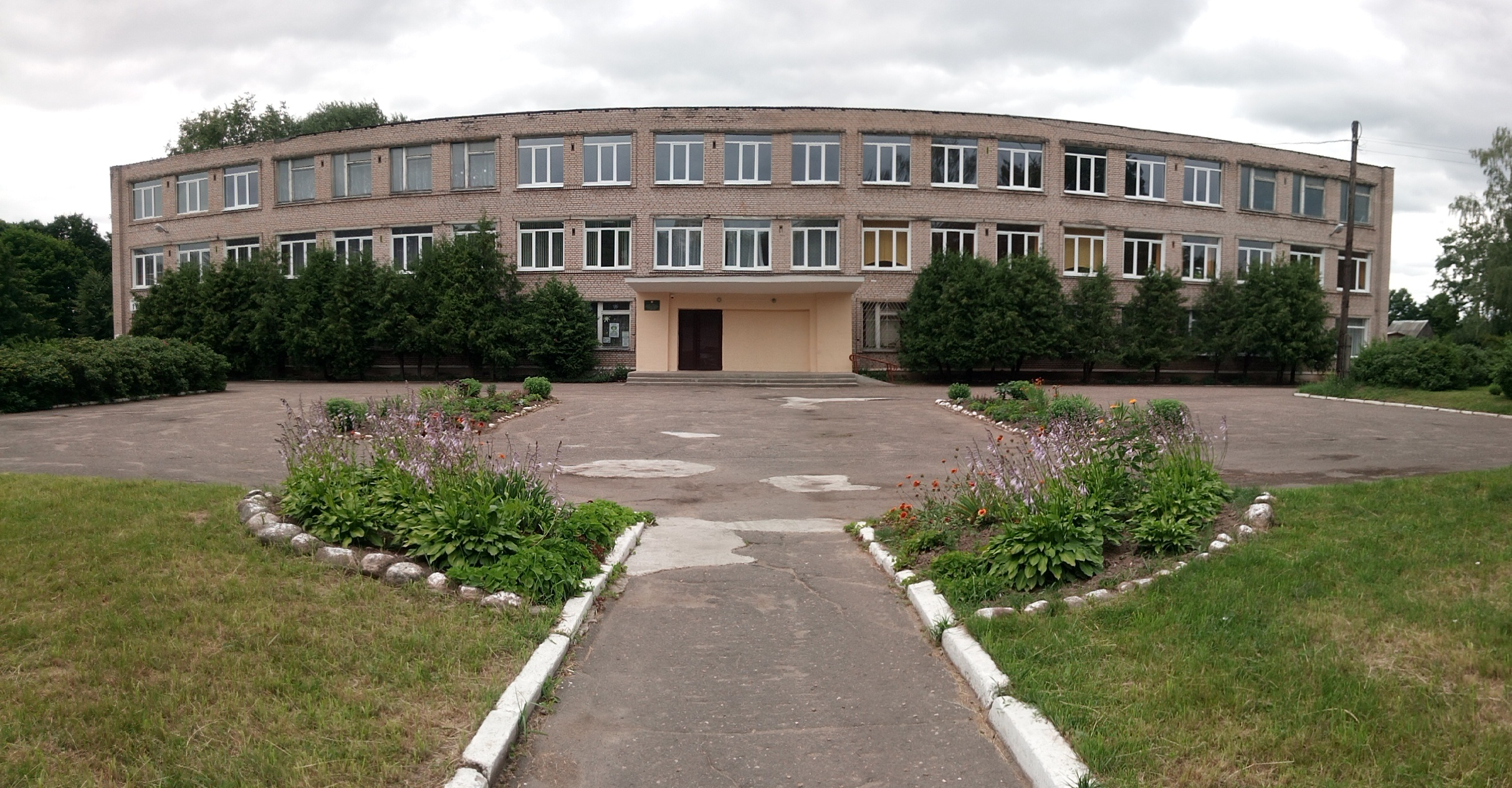 Старая школа